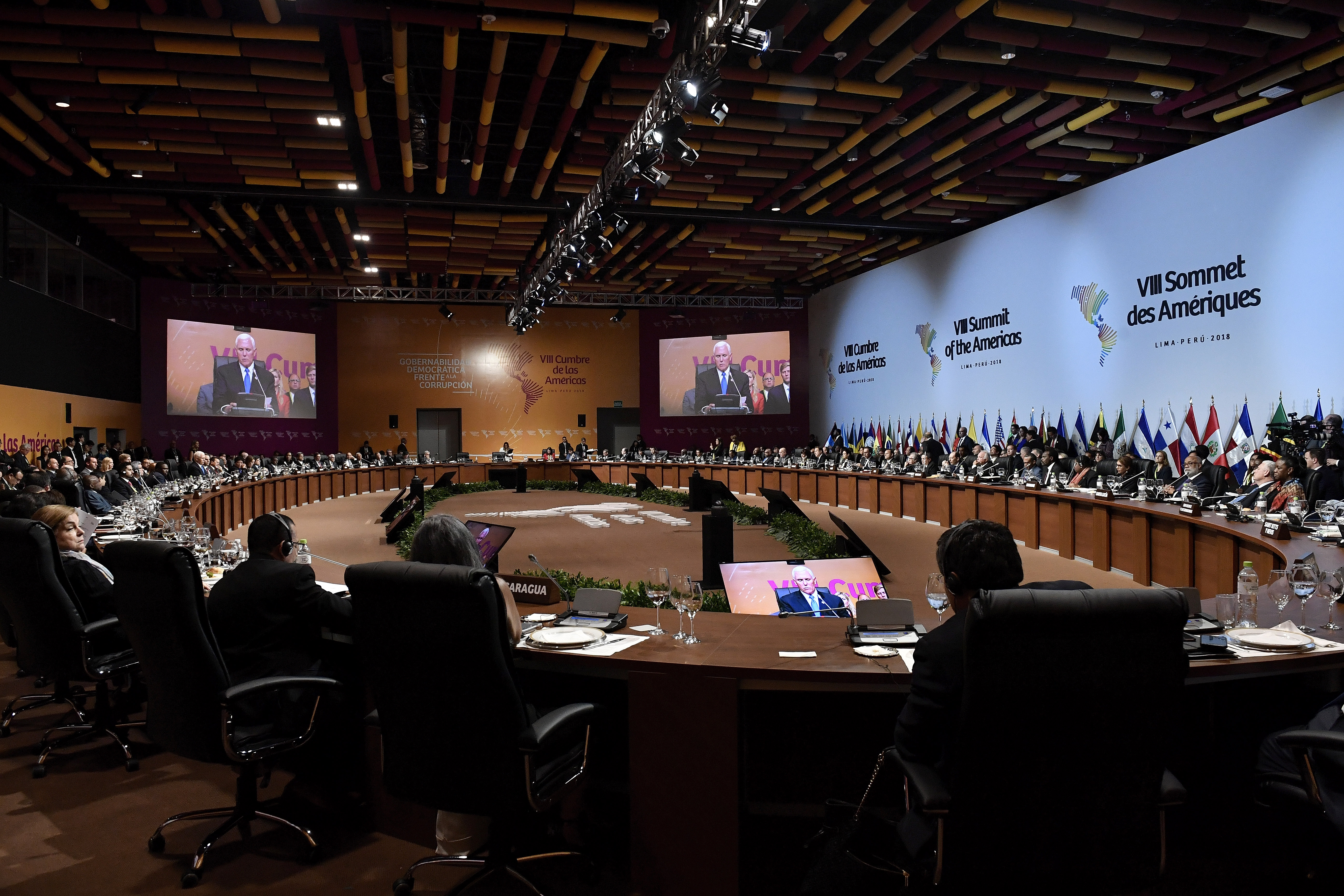 Inauguración Sesión Plenaria de la VIII Cumbre de las Américas